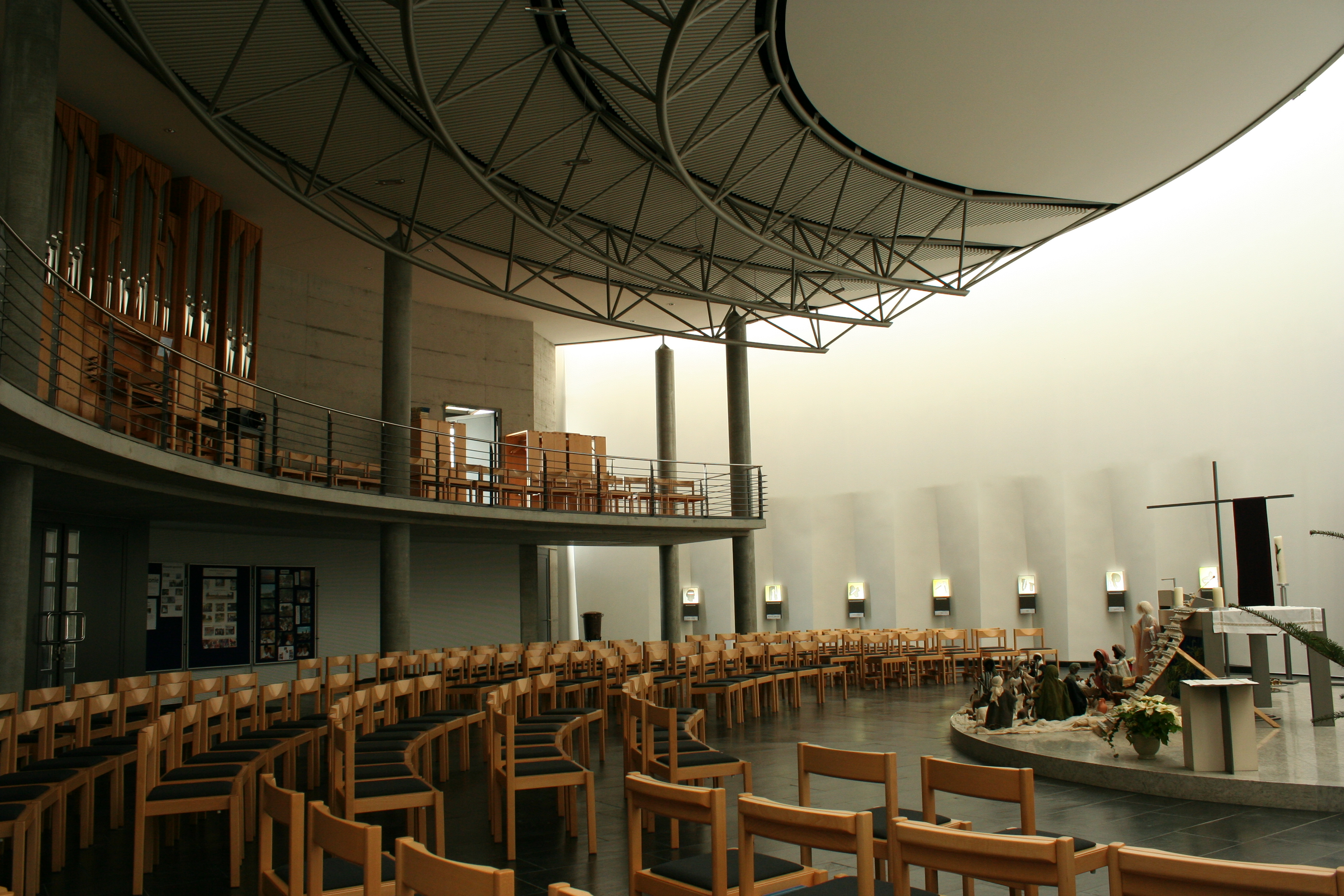 Römisch-katholische Pfarrkirche Hl. Dreifaltigkeit Zollikon, Innenansicht